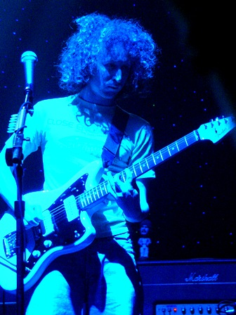 Brandon Boyd von Incubus live in San Sebastian